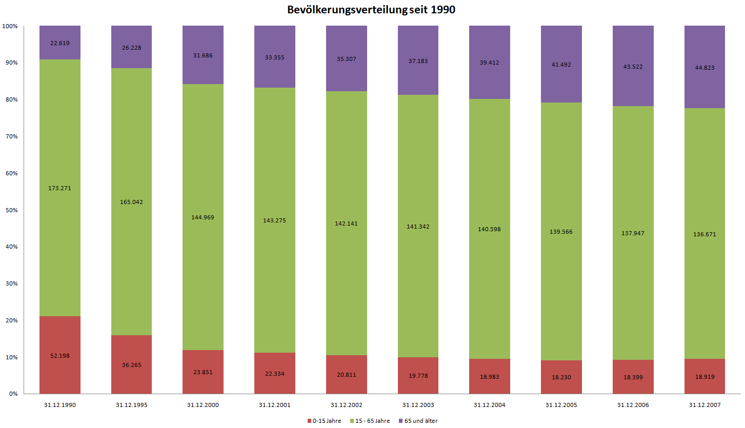 Alterverteilung in Rostock seit 1990 nach Stadtteilen